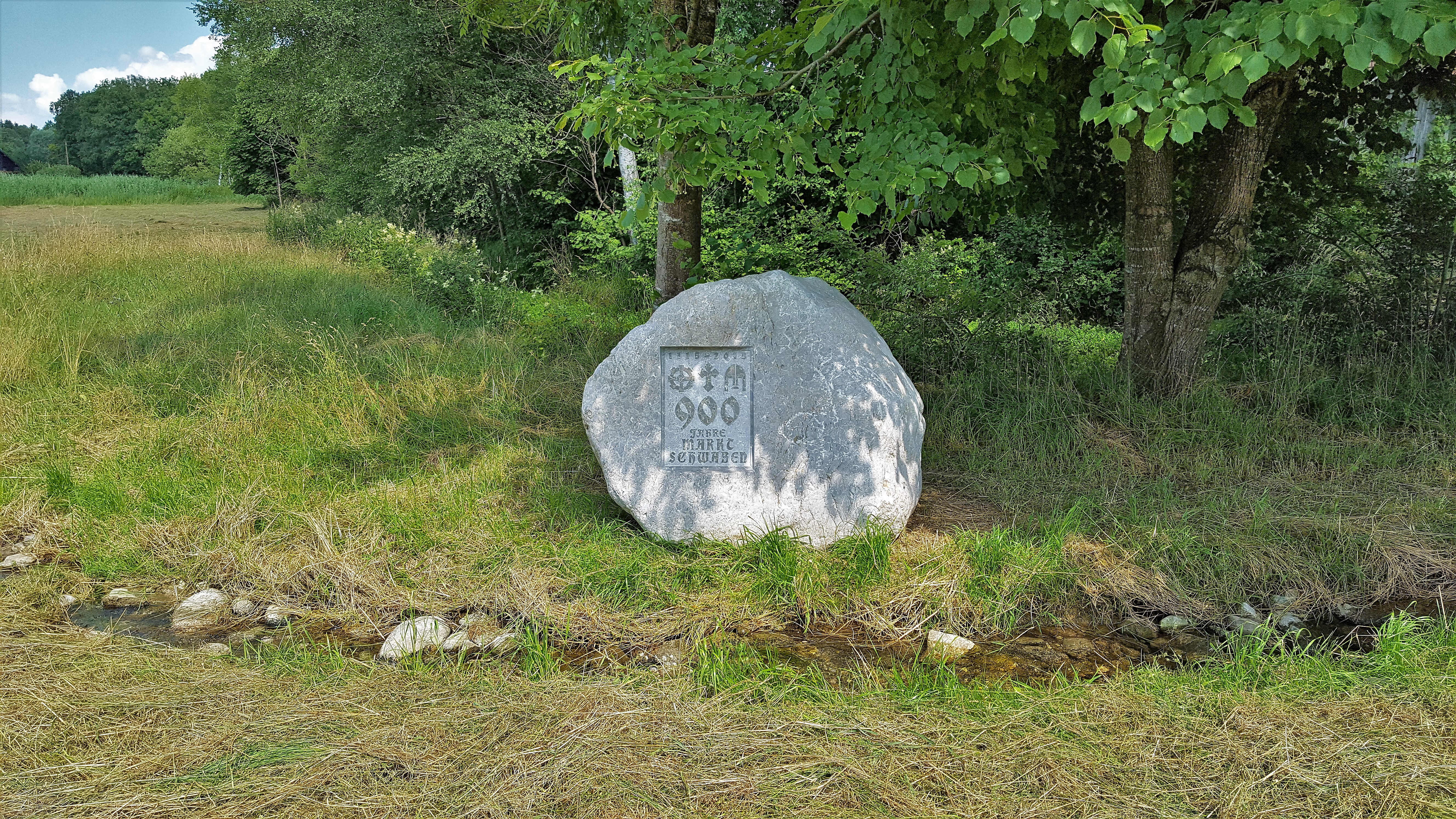 Gedenkstein 900 Jahre Markt Schwaben 2015